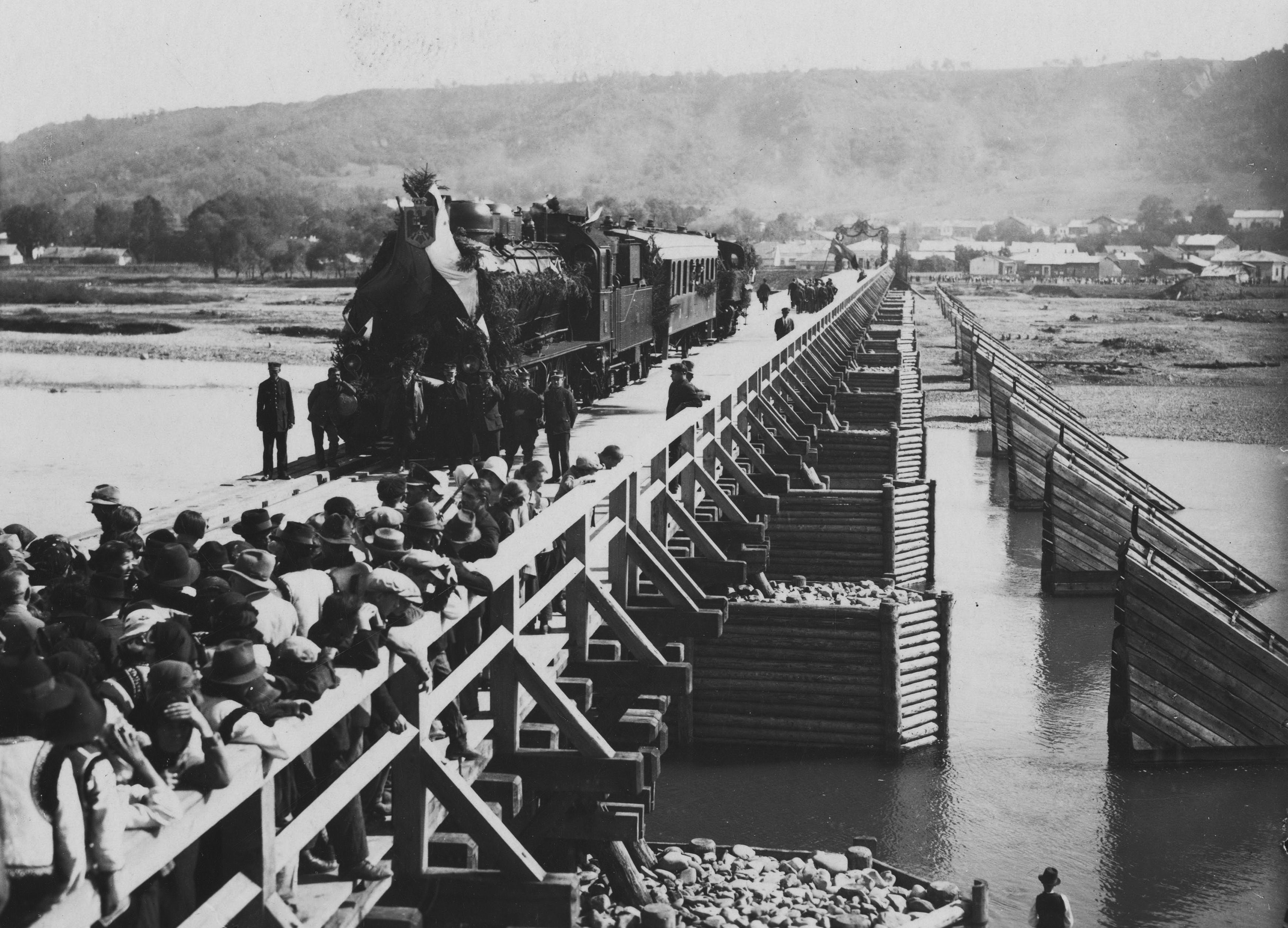 Otwarcie mostu w Kutach (lato 1930).